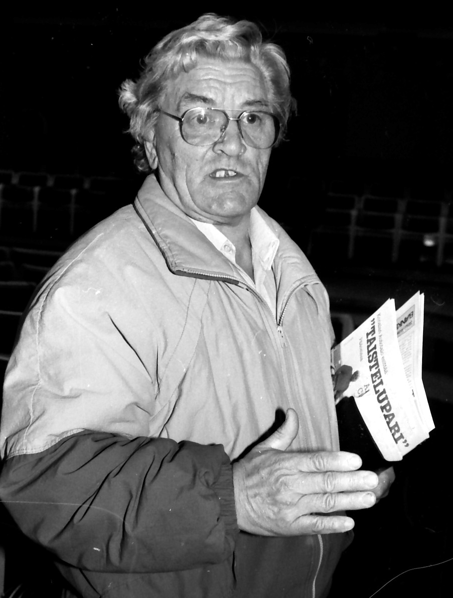 Veikko Hursti Kuusankoskella 1987